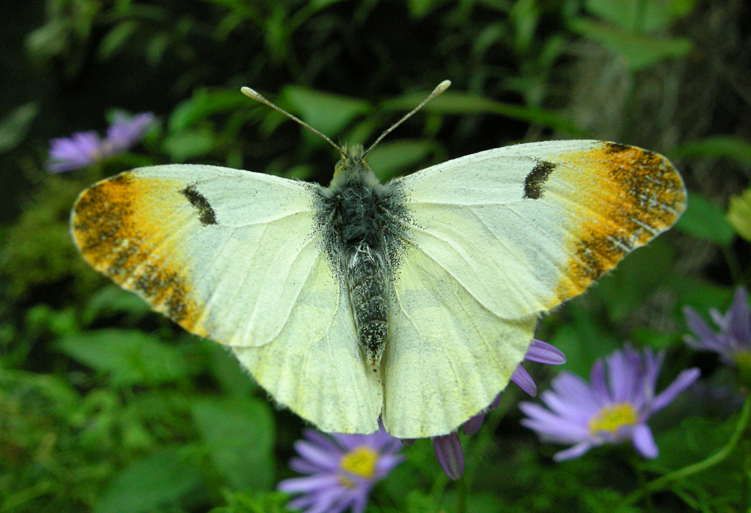 Anthocharis euphenoides, female